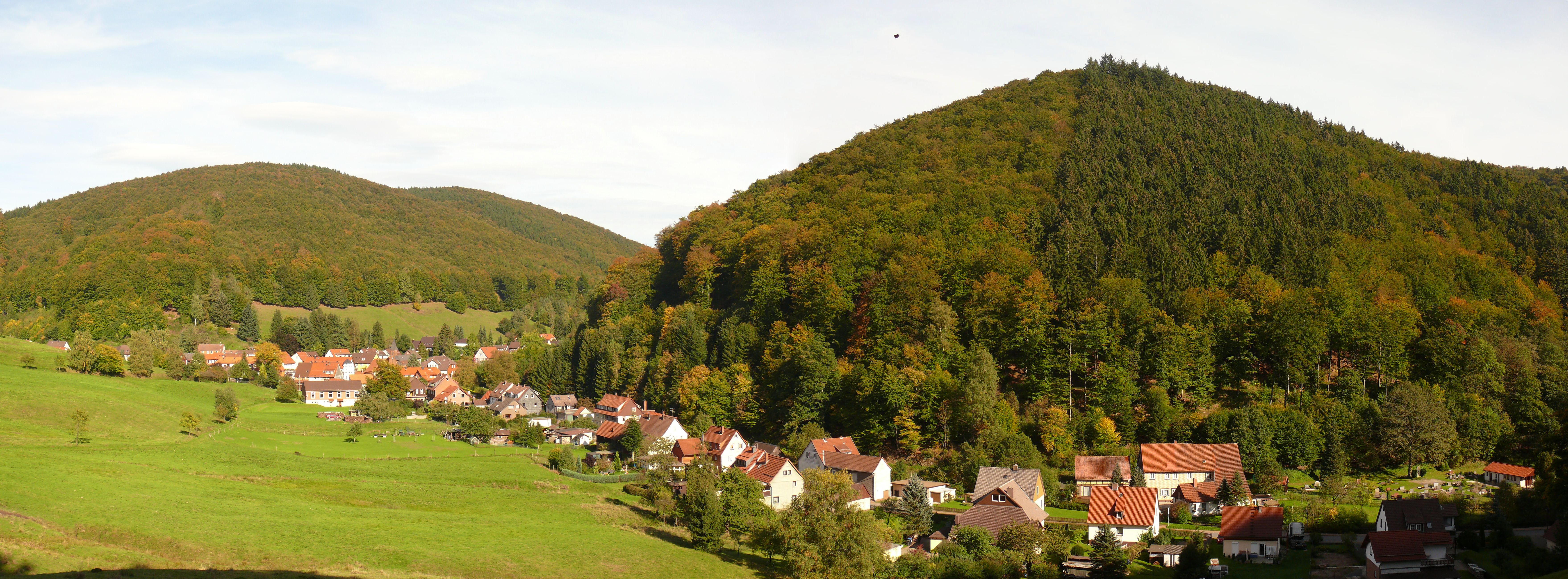 West-Panorama von Lonau, einem Ortsteil von Herzberg am Harz